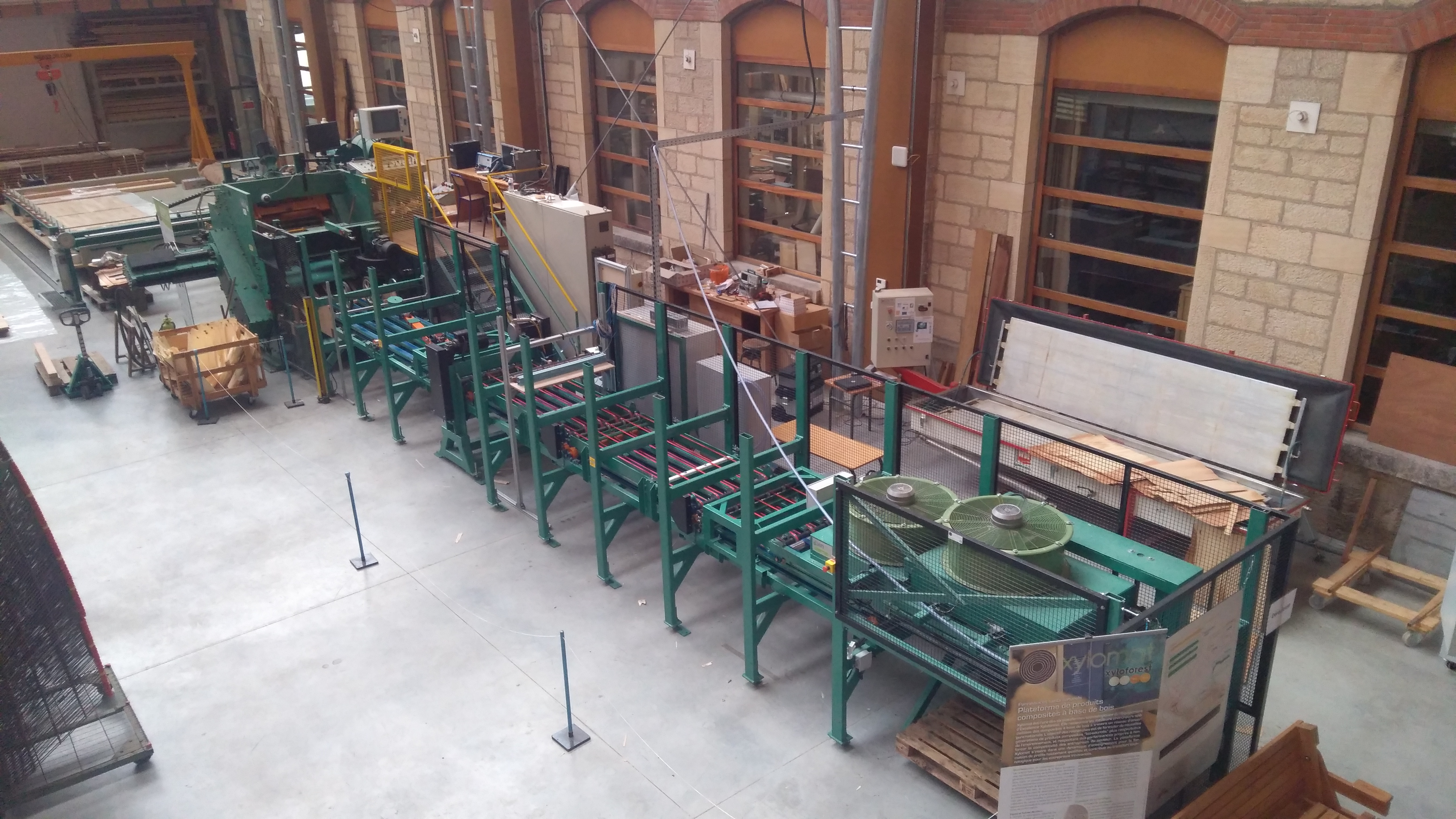 ligne de déroulage, au fond la dérouleuse qui déverse les placages sur un tapis roulant sur lequel sont montés en ligne le codeur de longueur, différents capteurs, le massicot et à la fin le système d'empilage.